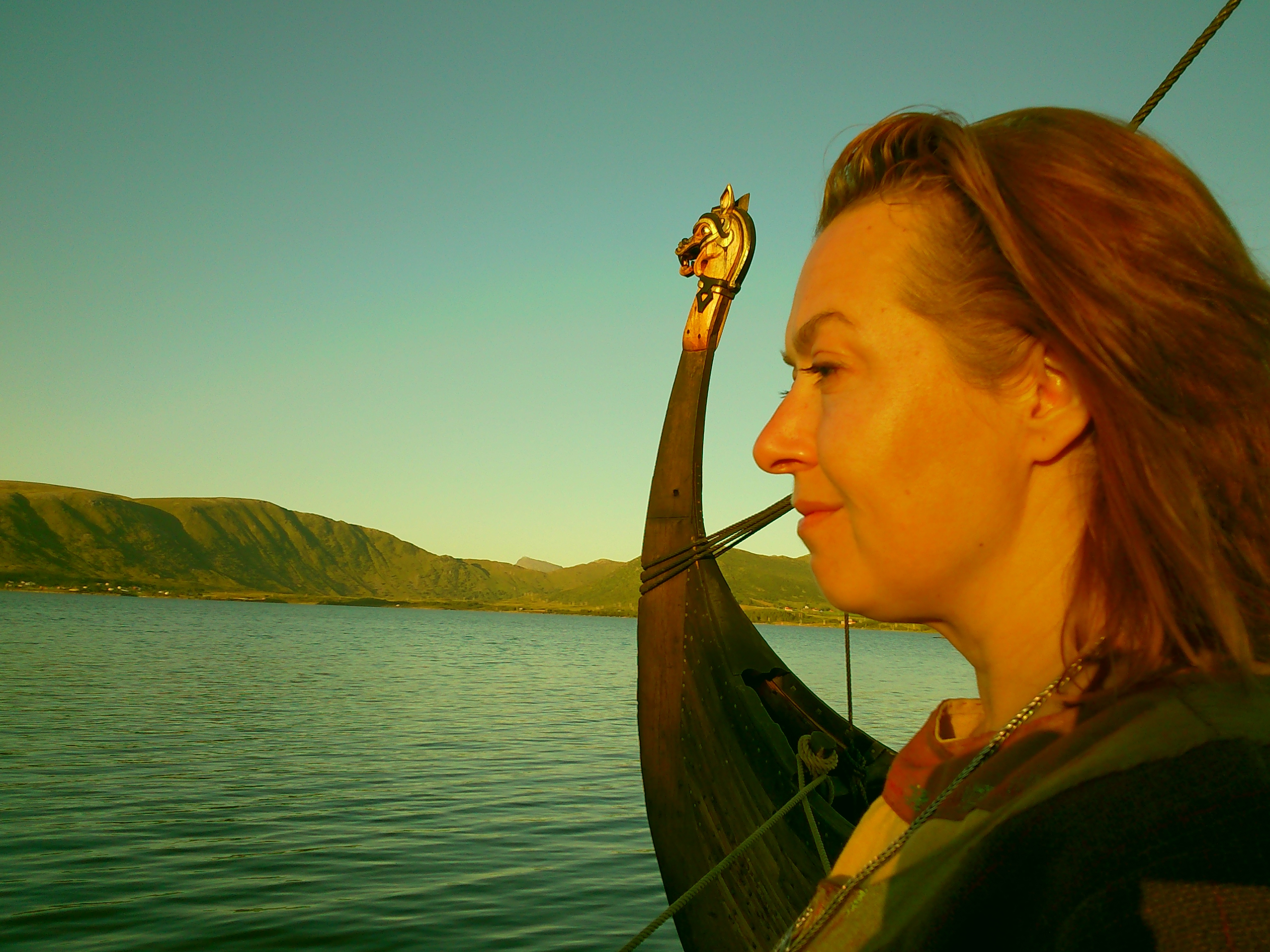 Elżbieta Cherezińska Lofoty Norwegia